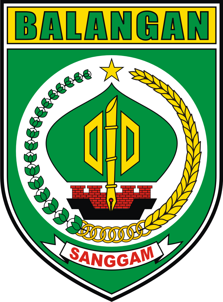 Lambang Kabupaten Balangan